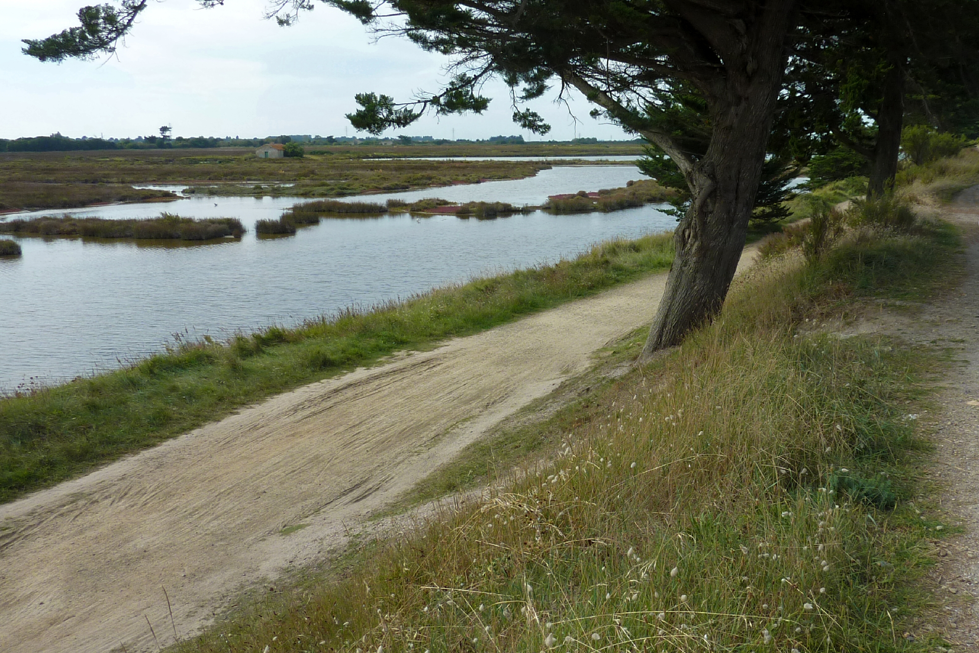 Polder de Sébastopol Île de Noirmoutier Vendée France